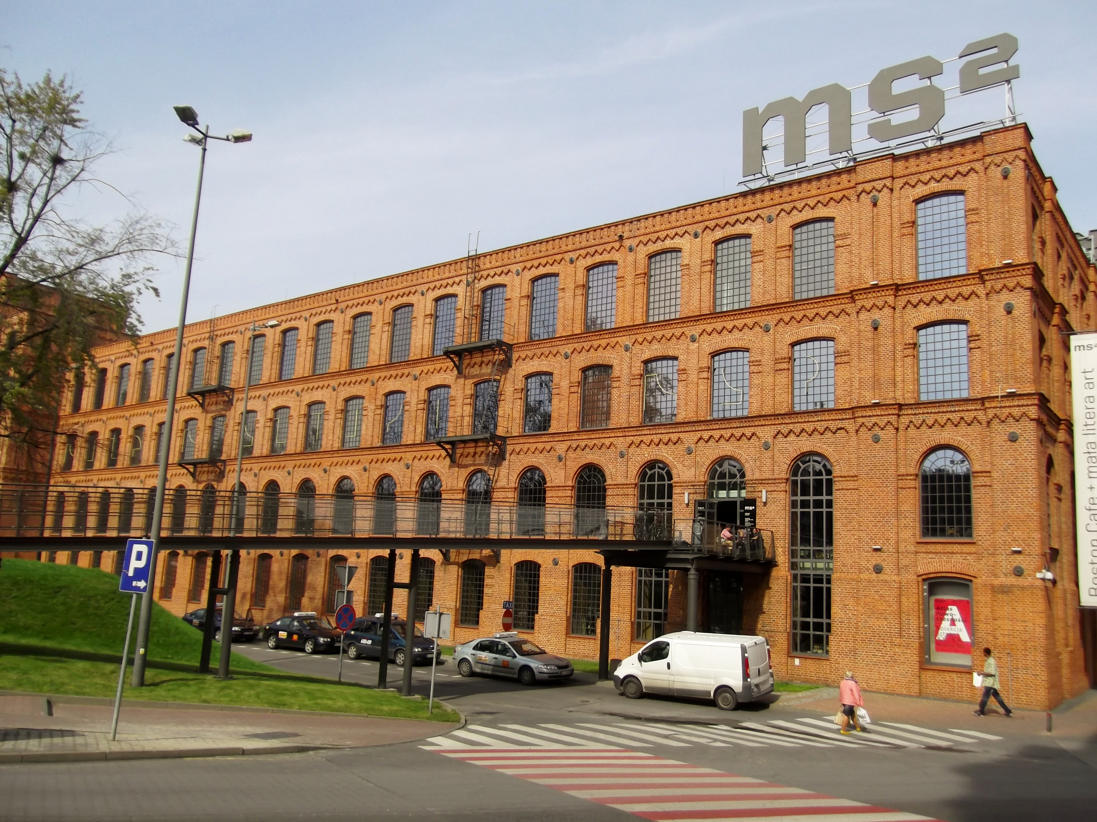 Łódź, tkalnia wysoka (ob. ms2), 1895